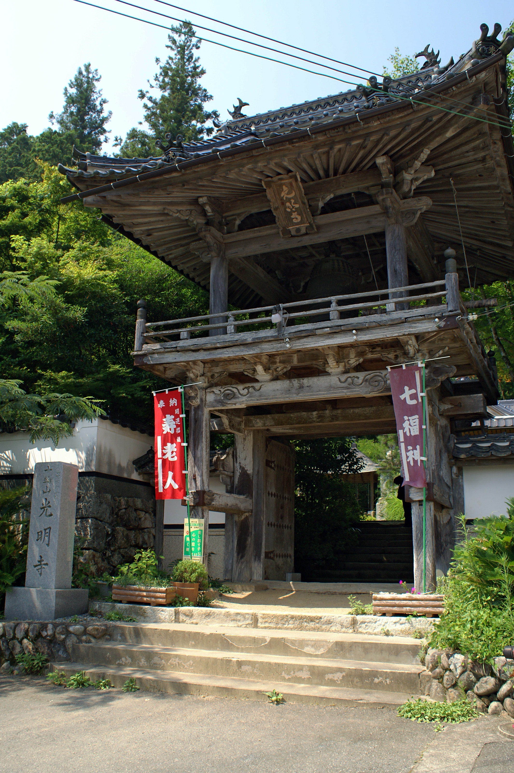 Komyoji in Hirafuku, Sayo, Hyogo, Japan